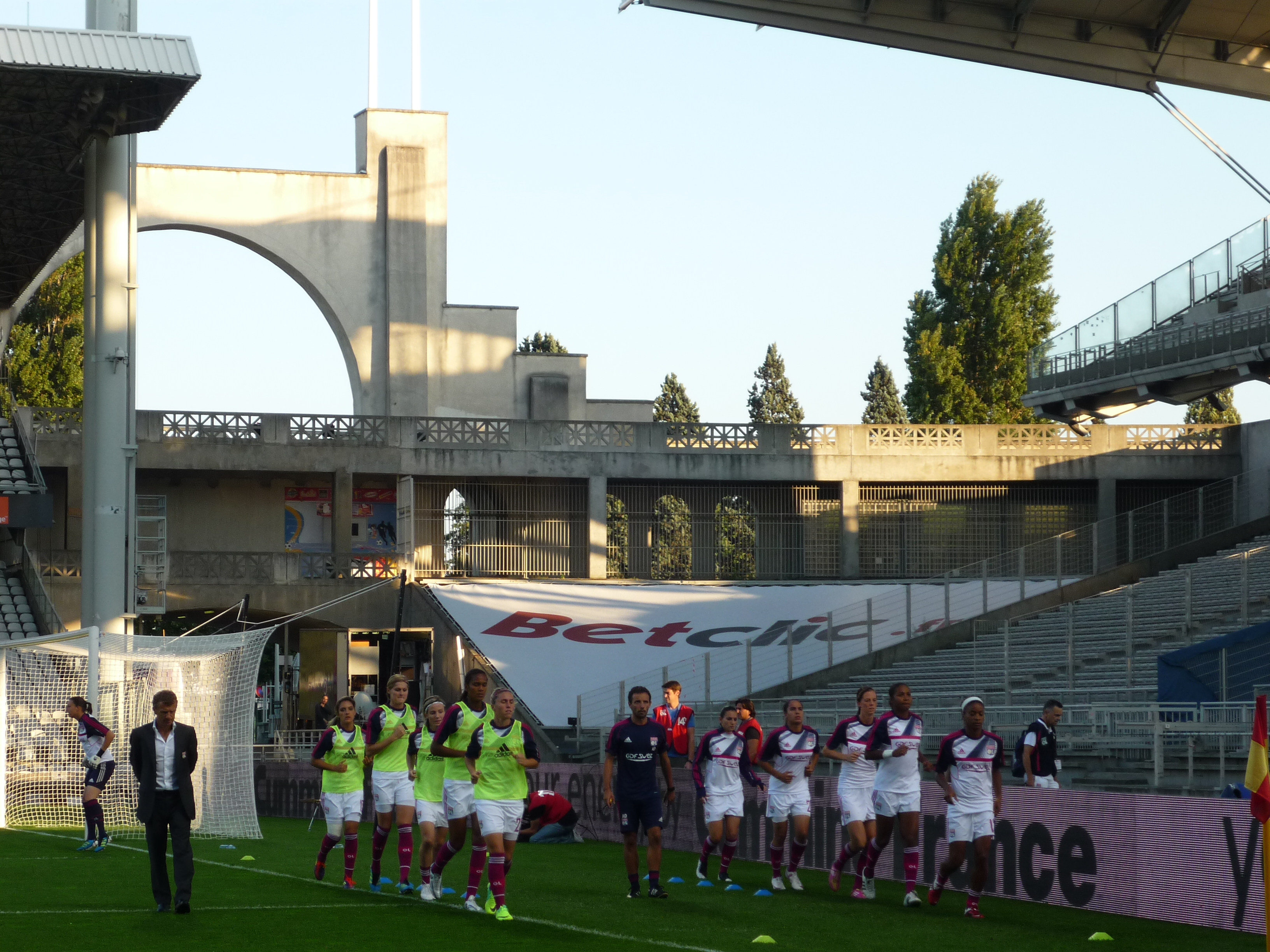 Entrainement de l'équipe féminine de l'Olympique lyonnais, en deux groupes, avec Patrice Lair, leur entraineur à gauche, lors de OL - Olimpia Cluj lors des 16e de finale retour de la Ligue des champions 2011-2012.